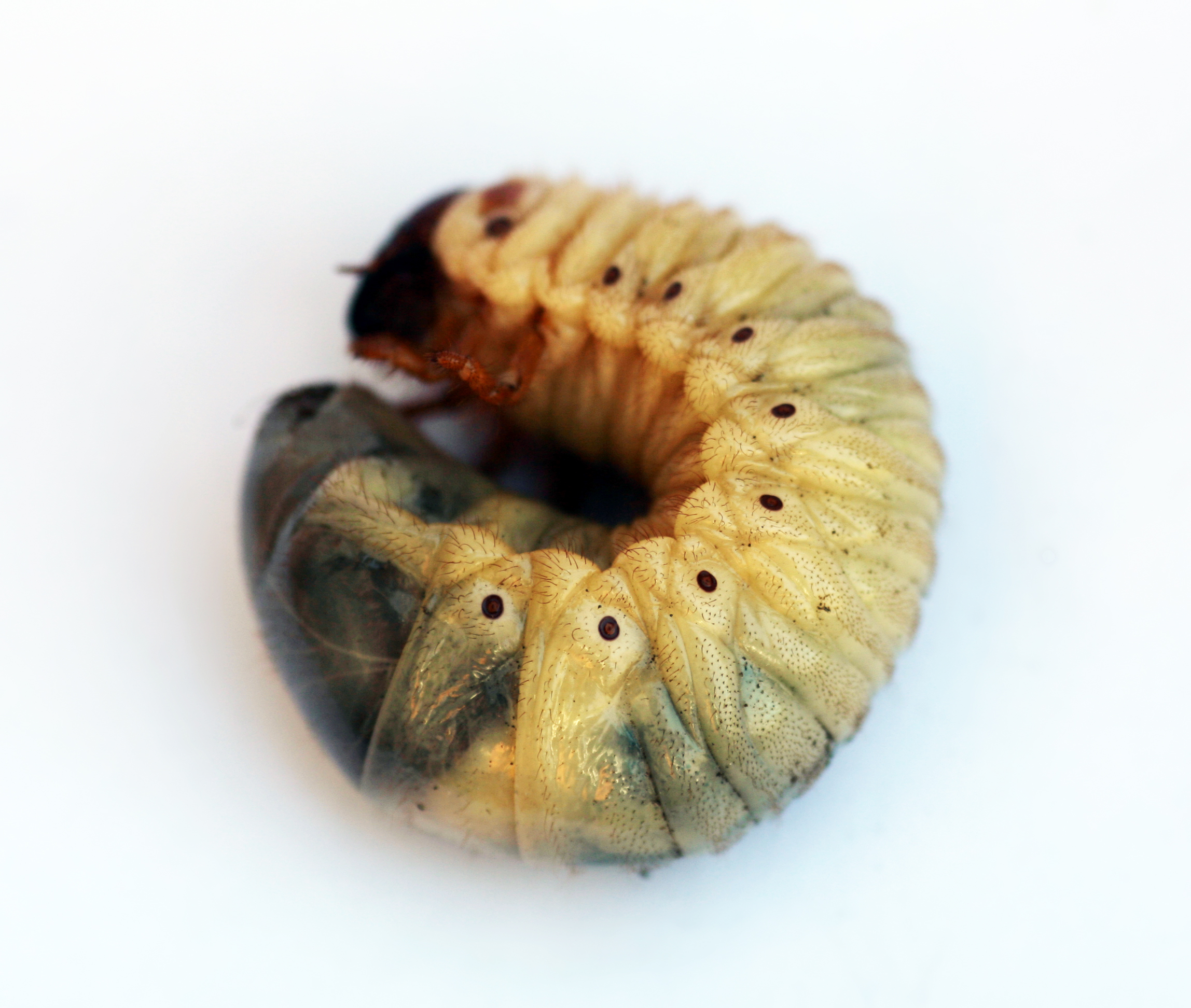 Trouver dans l'Hérault